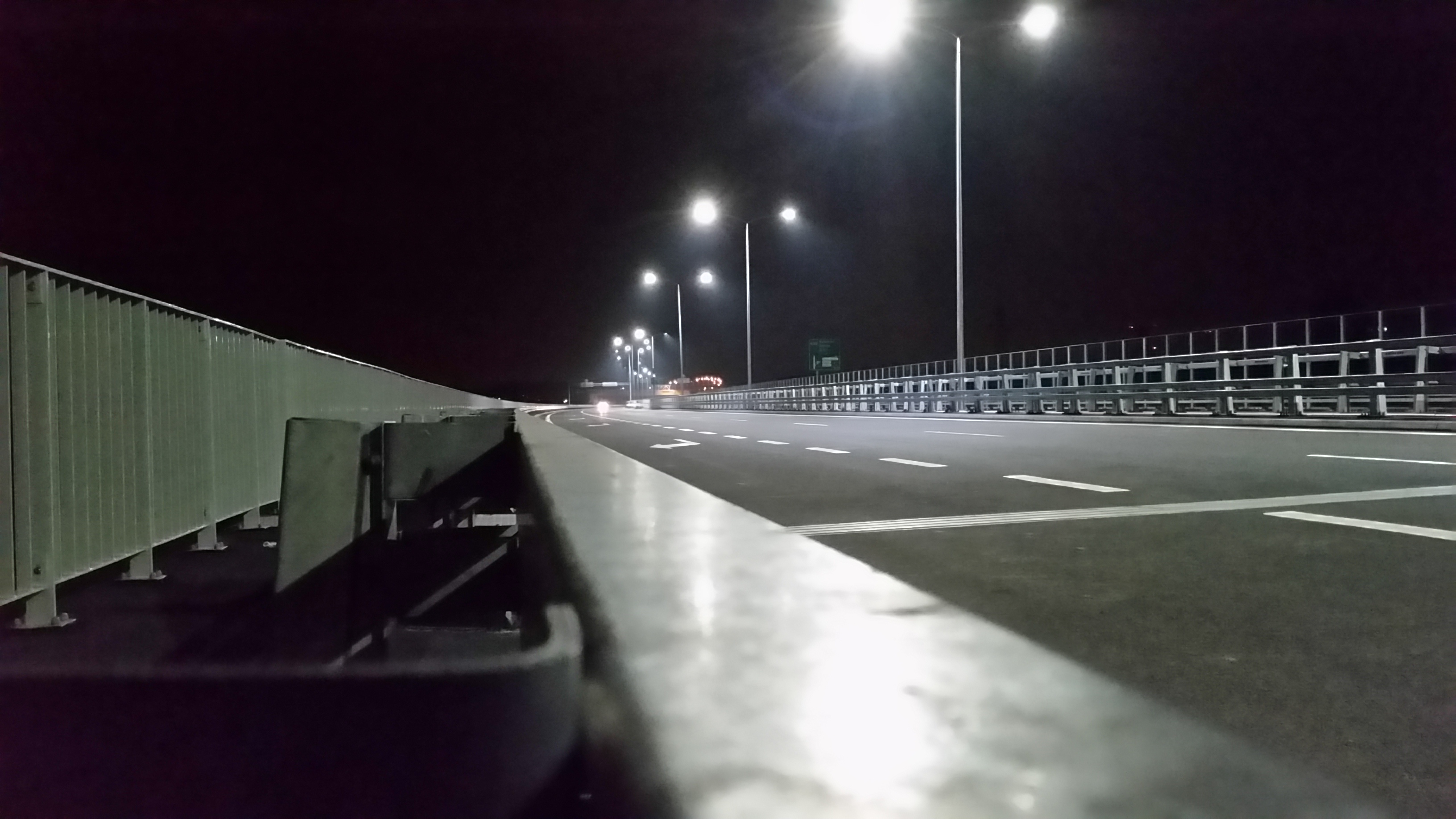 Jeden z pierwszych samochodów po otawrciu wjeżdża na estakadę DTŚ w Gliwicach Sośnicy od strony Zabrza